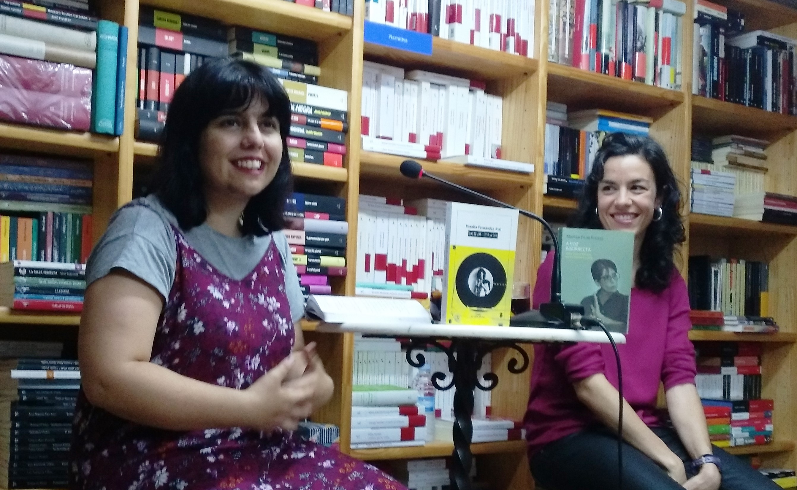 Montse Pena Presas e Rosalía Fernández Rial na libraría Paz de Pontevedra